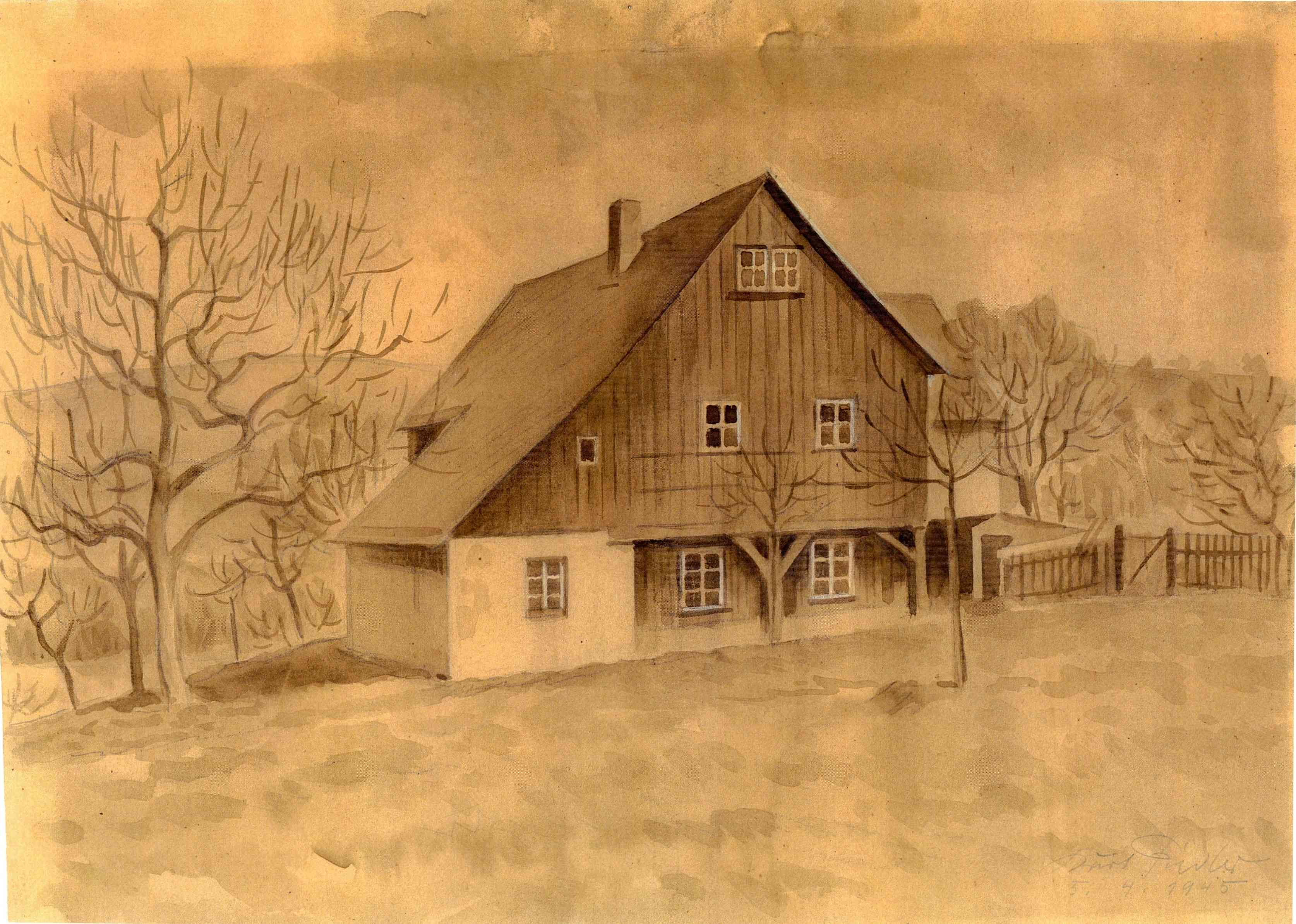 Geburtshaus des Dresdner Grafikers Kurt Fiedler in Eichbusch; heutige Adresse: Eichbuscher Ring 10.